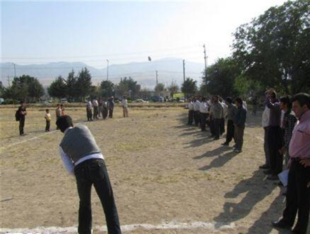 بازی محلی دال پلان